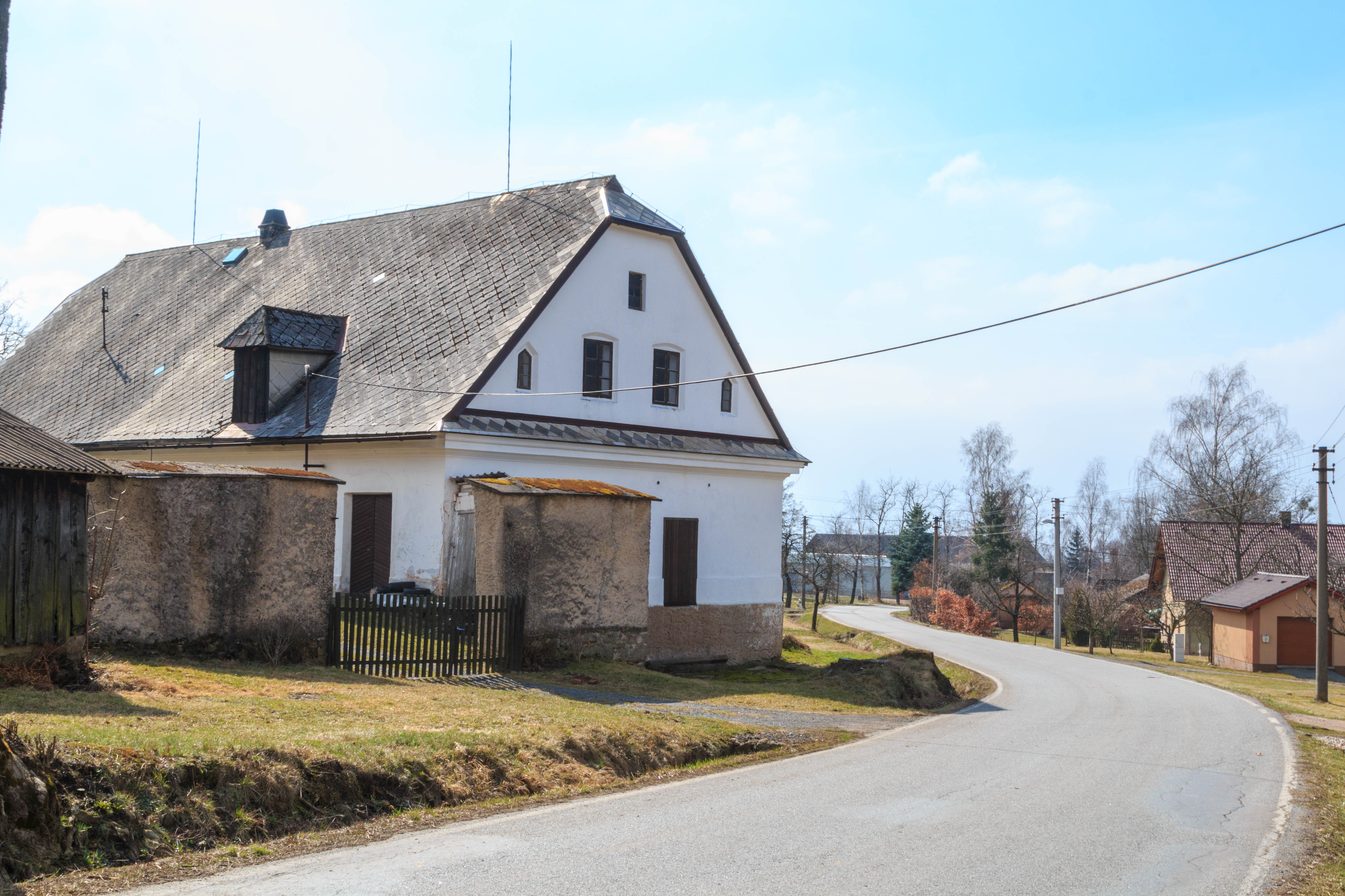 Hláska u Liberka - čp. 51